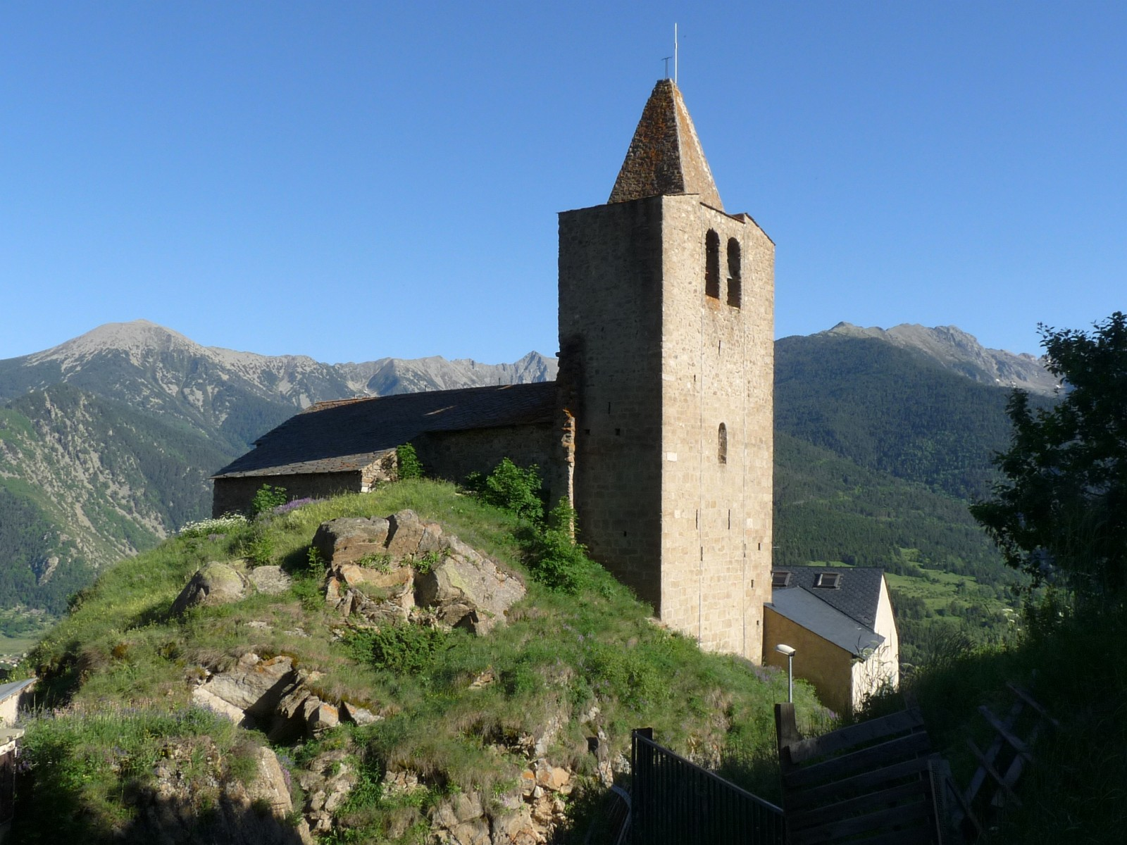 Eglise de Sauto, Pyrénées-Orientales, France